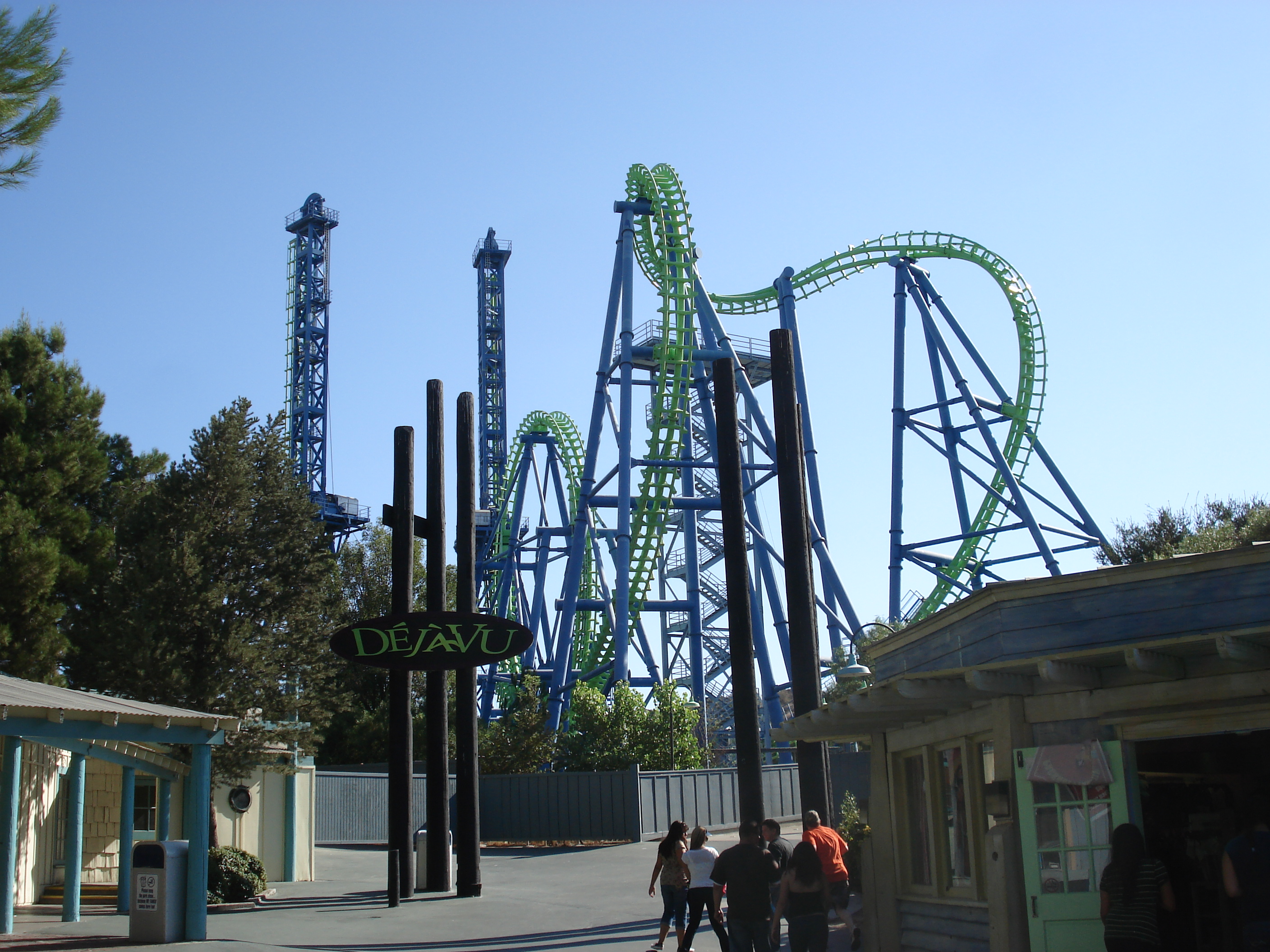 Déjà Vu roller coaster at Six Flags Magic Mountain